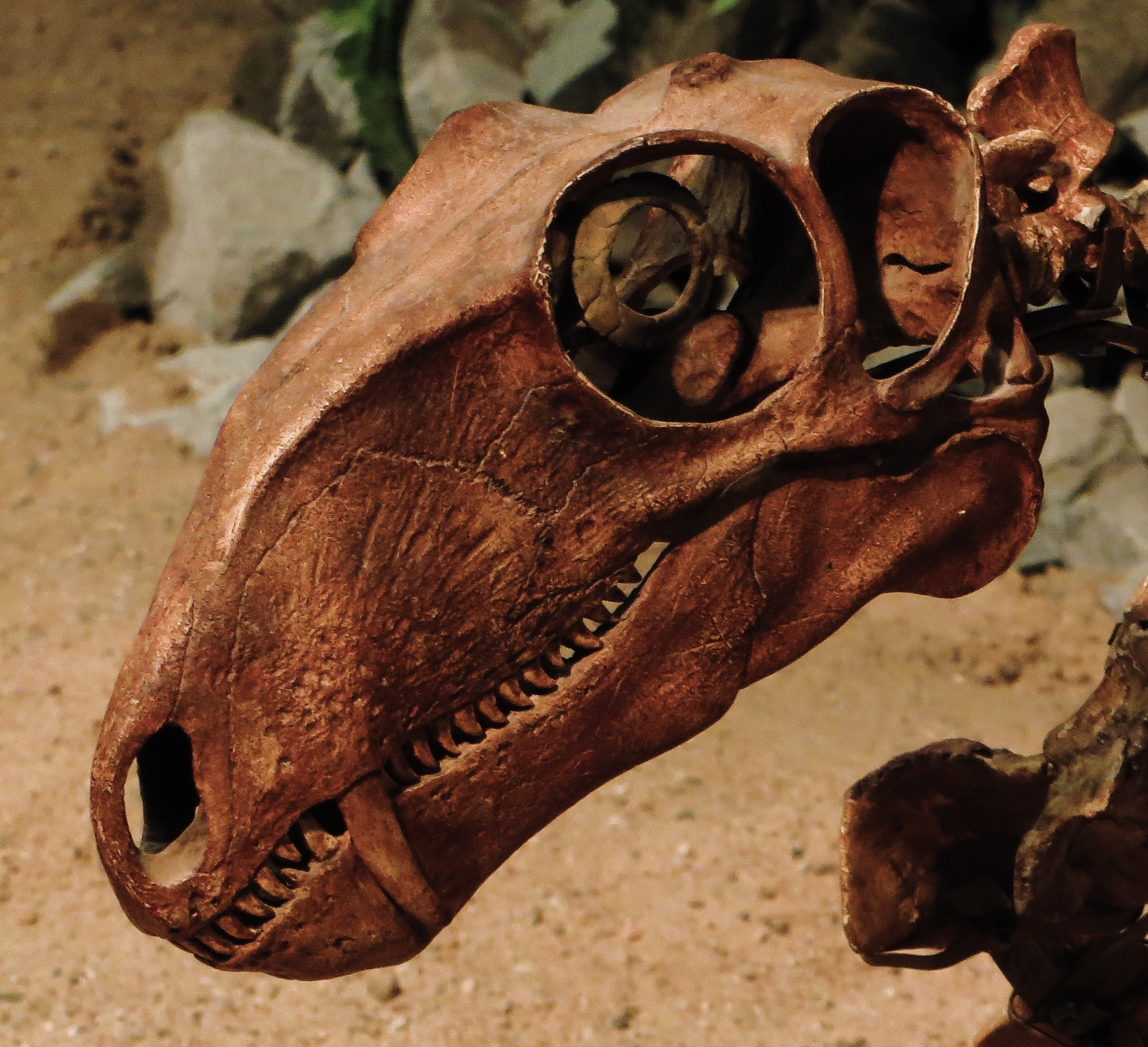 Fossil of Biarmosuchus, an extinct therapsid- Took the picture at Dinosaurium, Prague